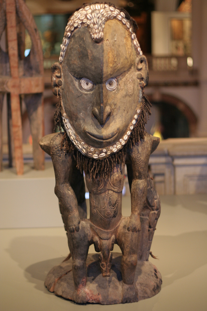 Sepik Redenaarsstoelen (2670-192A/2670-193/2670-194) Sepik Redenaarsstoel